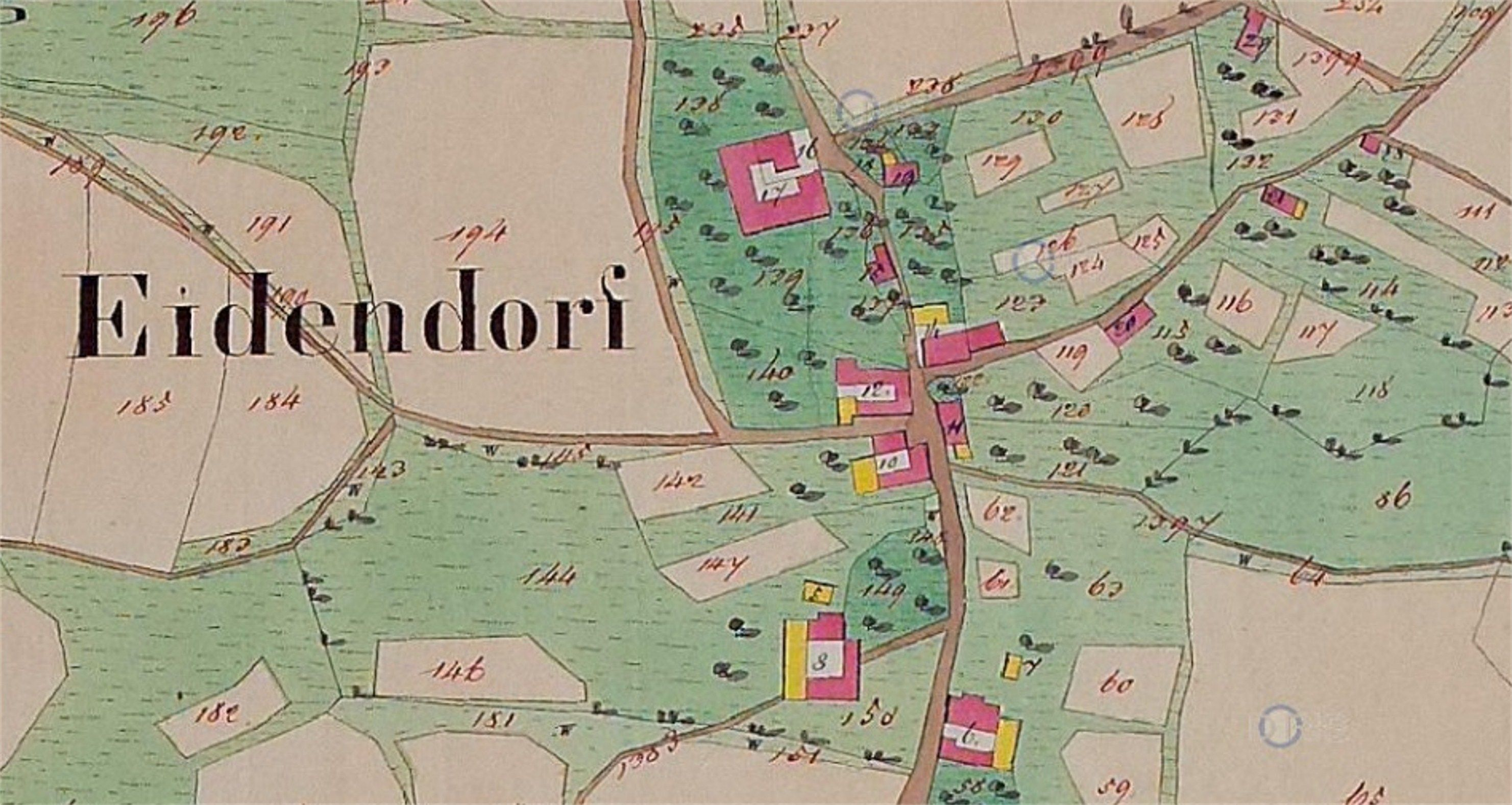 Lageplan von Eidendorf (Urmappe aus dem Franziszeischen Kataster von 1810)